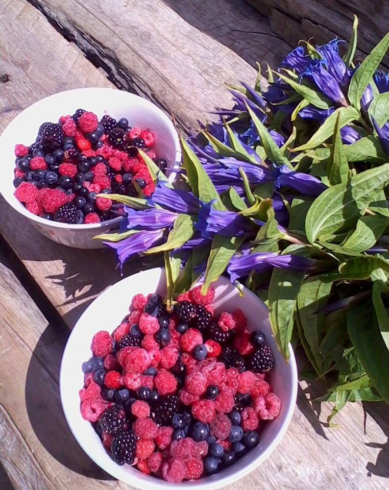 Fruta mjekesore: Medrat,Dredhezat, Manaferrat dhe Boronicat te vendosura ne dy ene qelqi dhe ne krah te tyre lule lejla karakteristike per Bjeshket e Tropojes